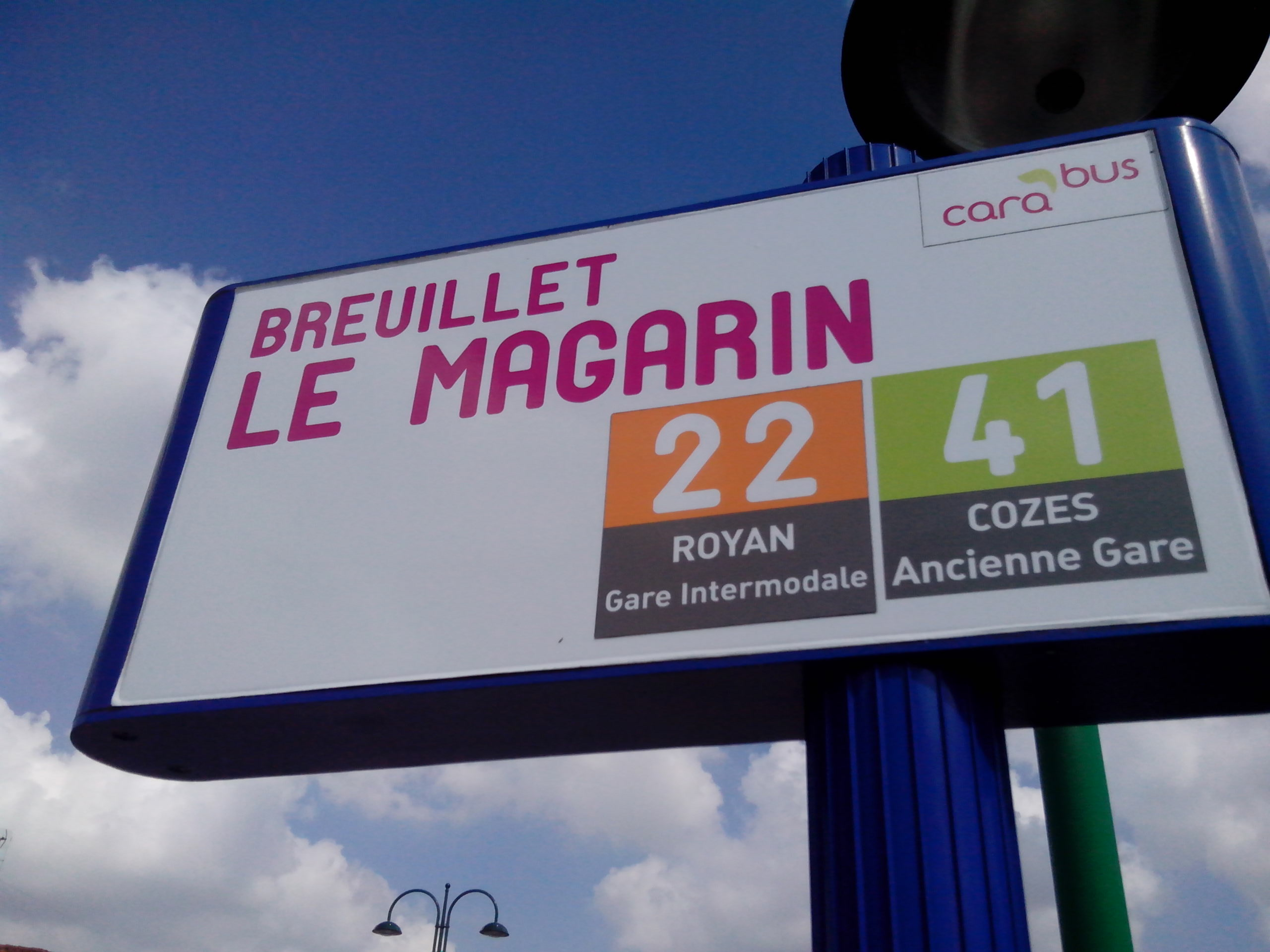 Station du réseau de transports urbains Carabus à Breuillet